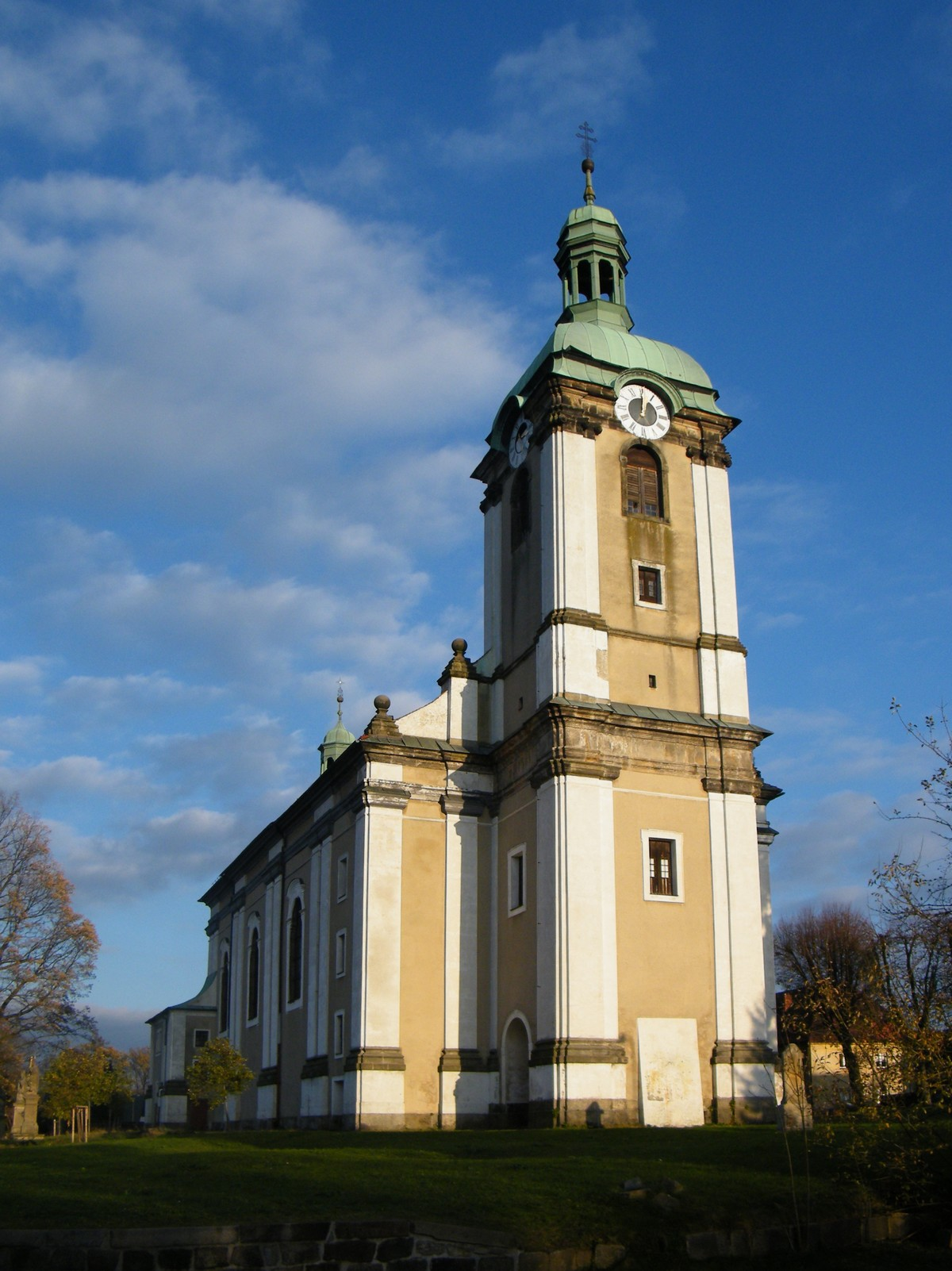 Kostel svatého Václava ve Šluknově